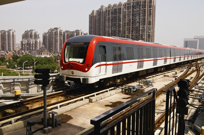 一列行驶在高架段的无锡地铁1号线